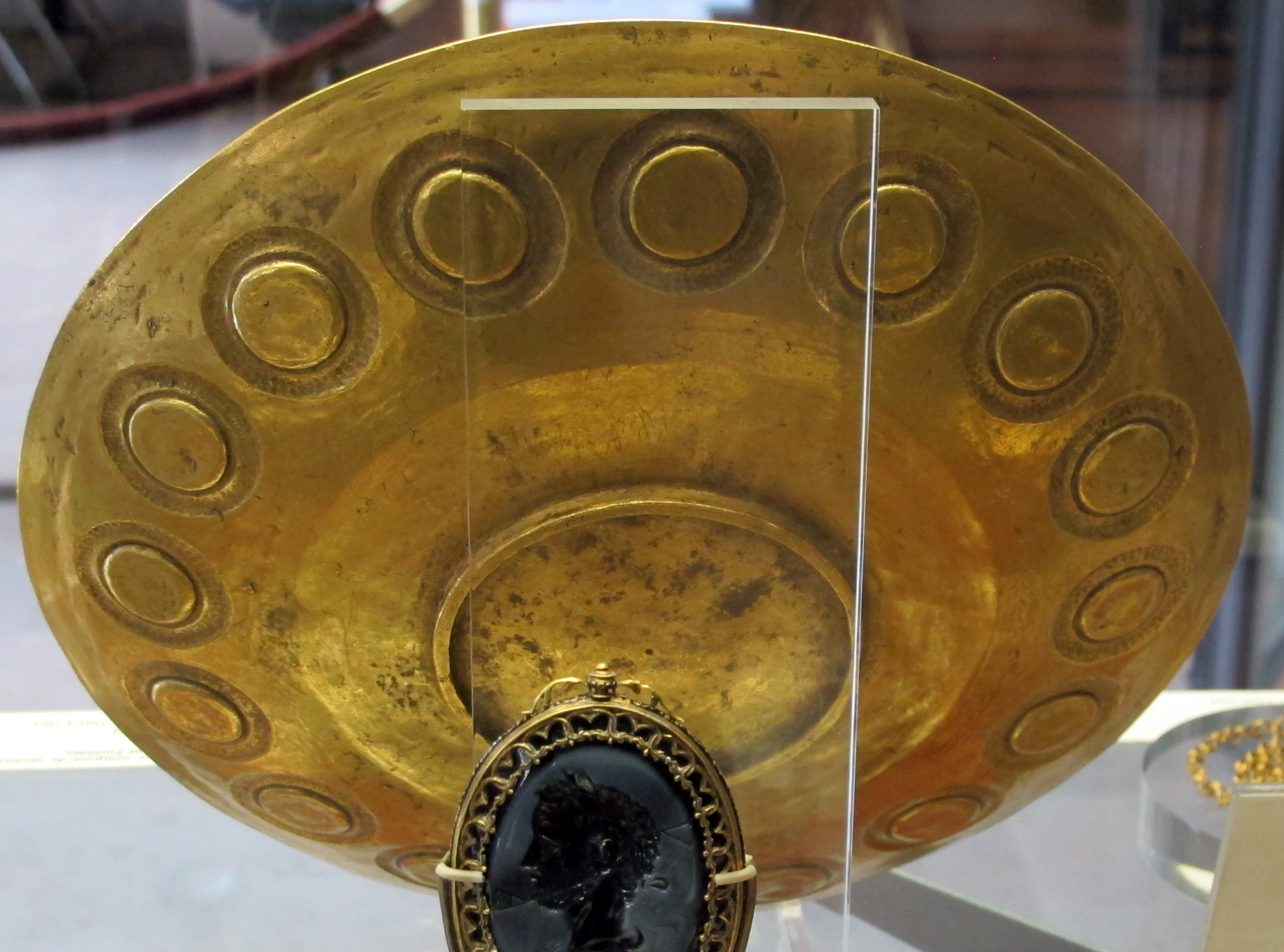 Arte romana, patera di rennes, 210 ca., dal tresoro di rennes (1774)